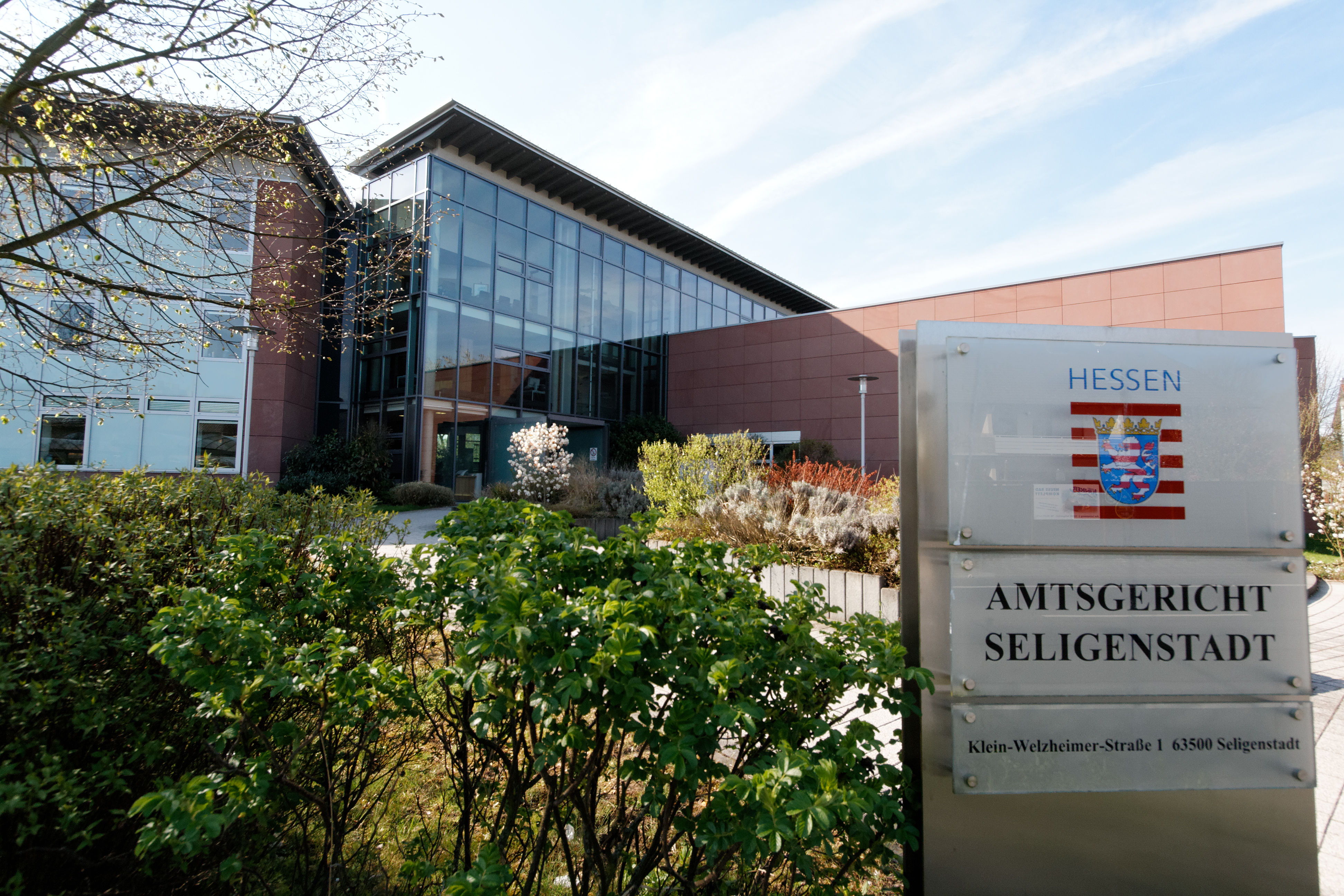 Amtsgericht in Seligenstadt (Hessen), erbaut 2003.